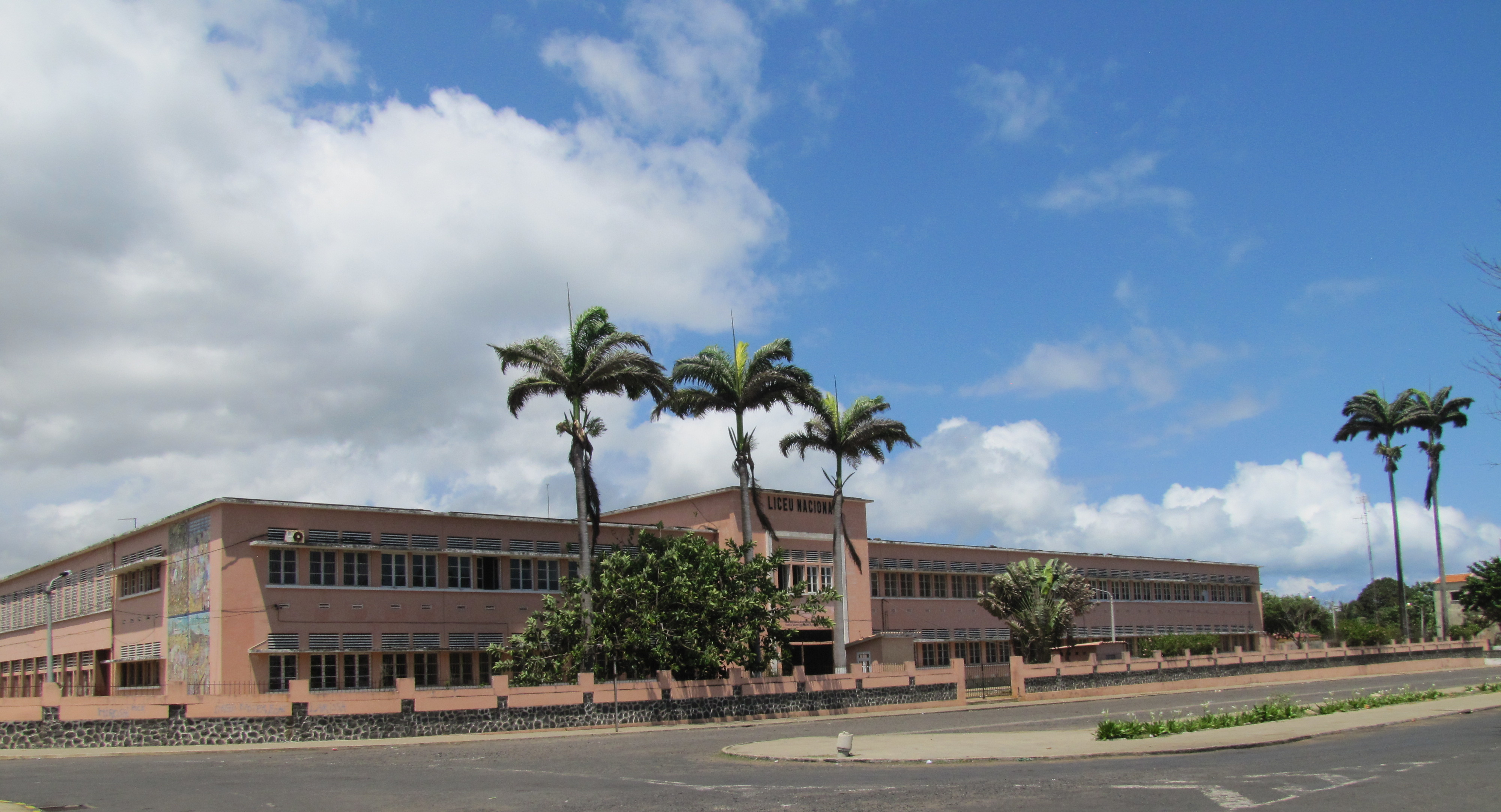 Sao Tome Liceu Nacional. antiga Escola Técnica Silva e Cunha Dados do mapa ©2017 Google Termos de Utilização Mapa Liceu Nacional [antiga Escola Técnica Silva e Cunha]